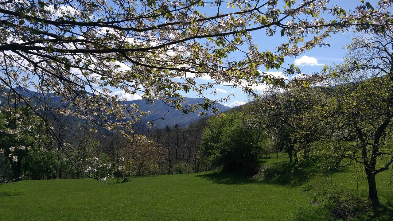 Fioriture primaverili in località "Poggio"